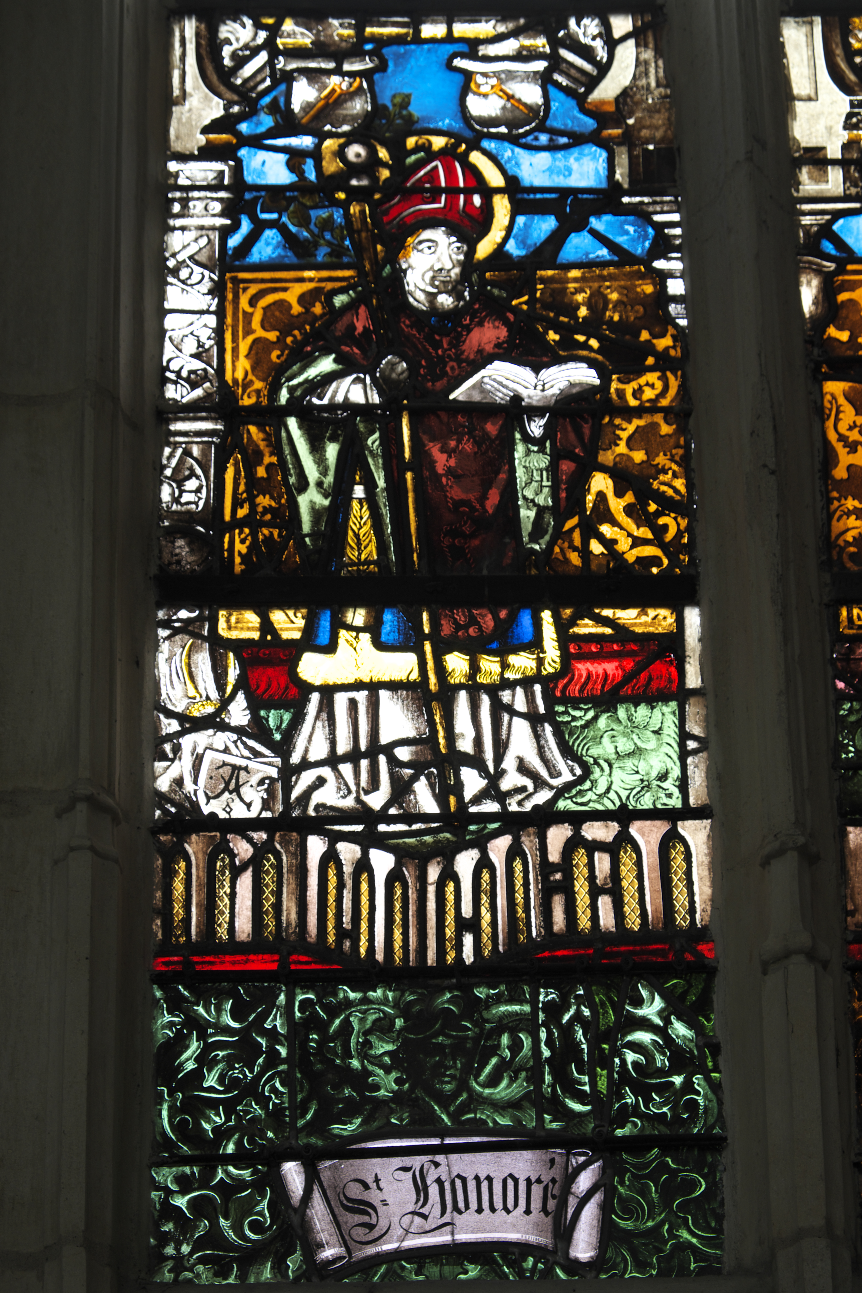 Bleiglasfenster (Baie 24) in der Basilika Saint-Nicolas in Saint-Nicolas-de-Port im Département Meurthe-et-Moselle (Lothringen/Frankreich), aus einer lothringer Werkstatt, um 1518; Darstellung: Hl. Honorius von Amiens